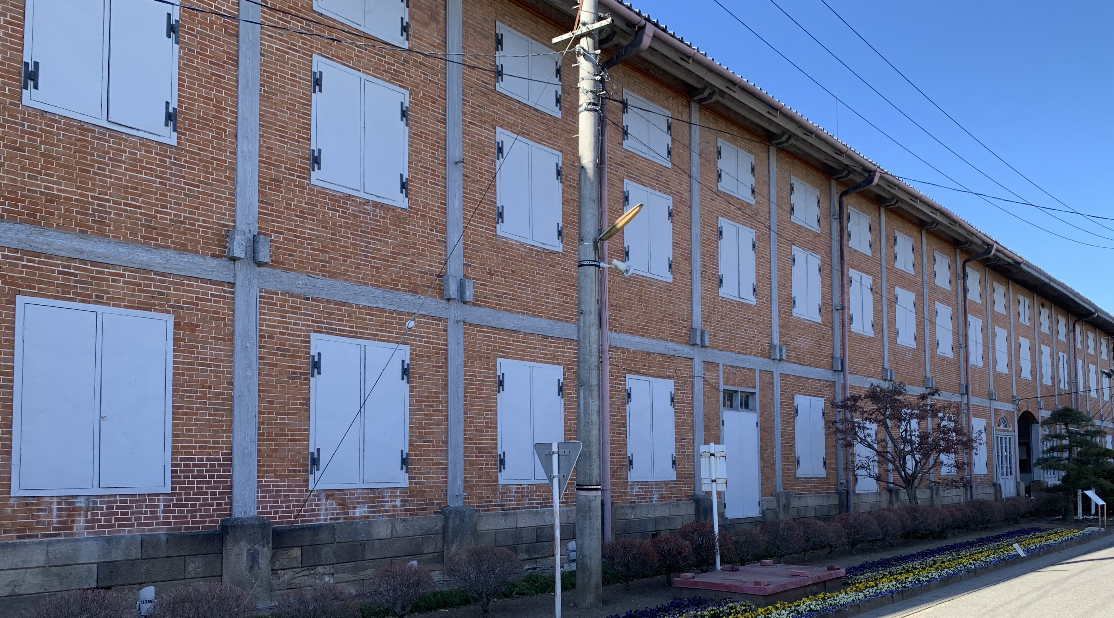 富岡製糸場 東置繭所 外観